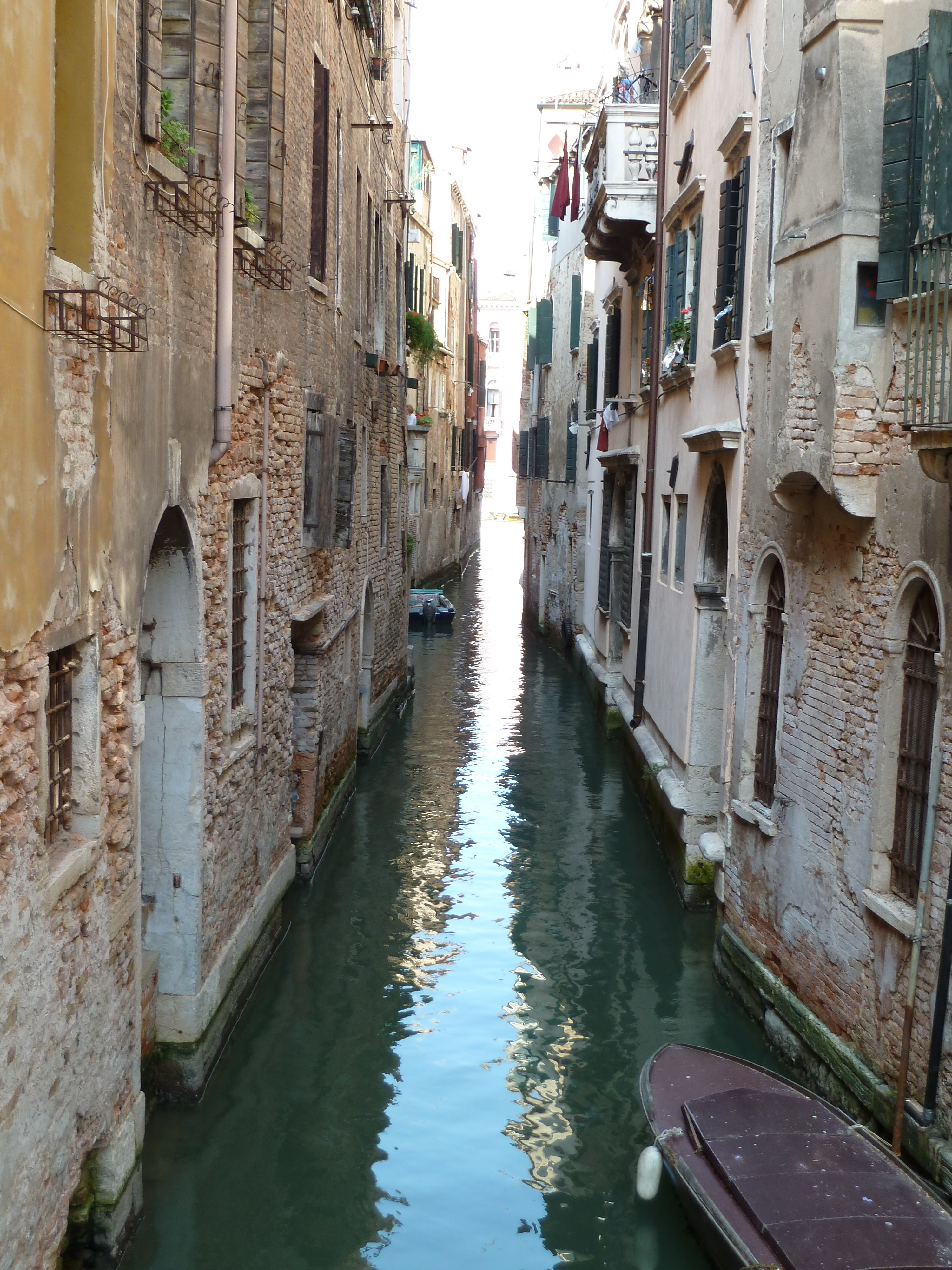 Rio di San Cassiano (Venice)